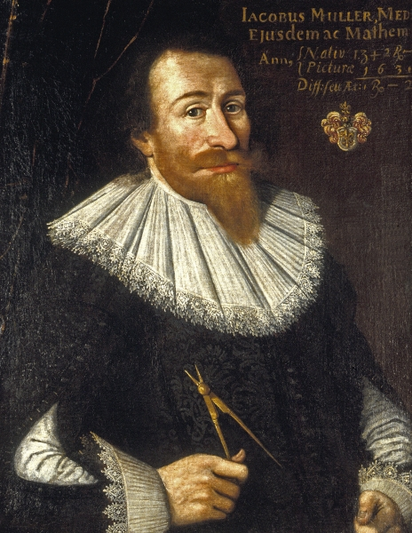 Jakob Müller (* 11. März 1594 Torgau; † 11. April 1637 Torgau) war ein deutscher Humanmediziner und Mathematiker. Wirkungsorte: 1618 Gießen. o. Prof. der Mathematik 1625 Marburg. o. Prof. d. Medizin